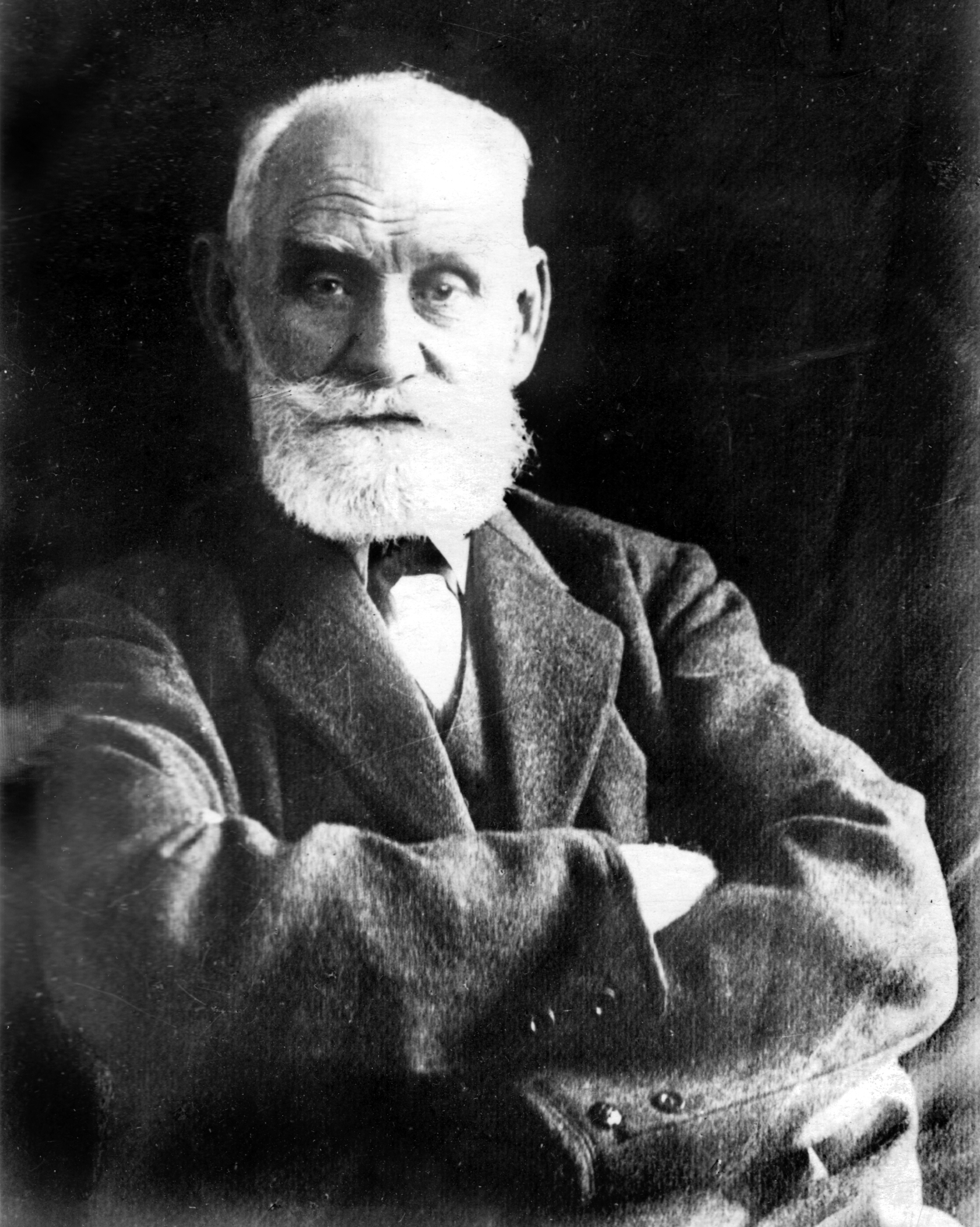 Иван Петрович Павлов в Российской Академии наук